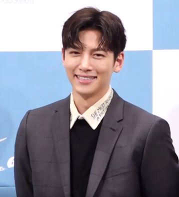 tvN 드라마 ‘날 녹여주오’ 제작발표회가 20일 오후 서울 강남구 논현동 임피리얼 팰리스 호텔에서 열렸다.